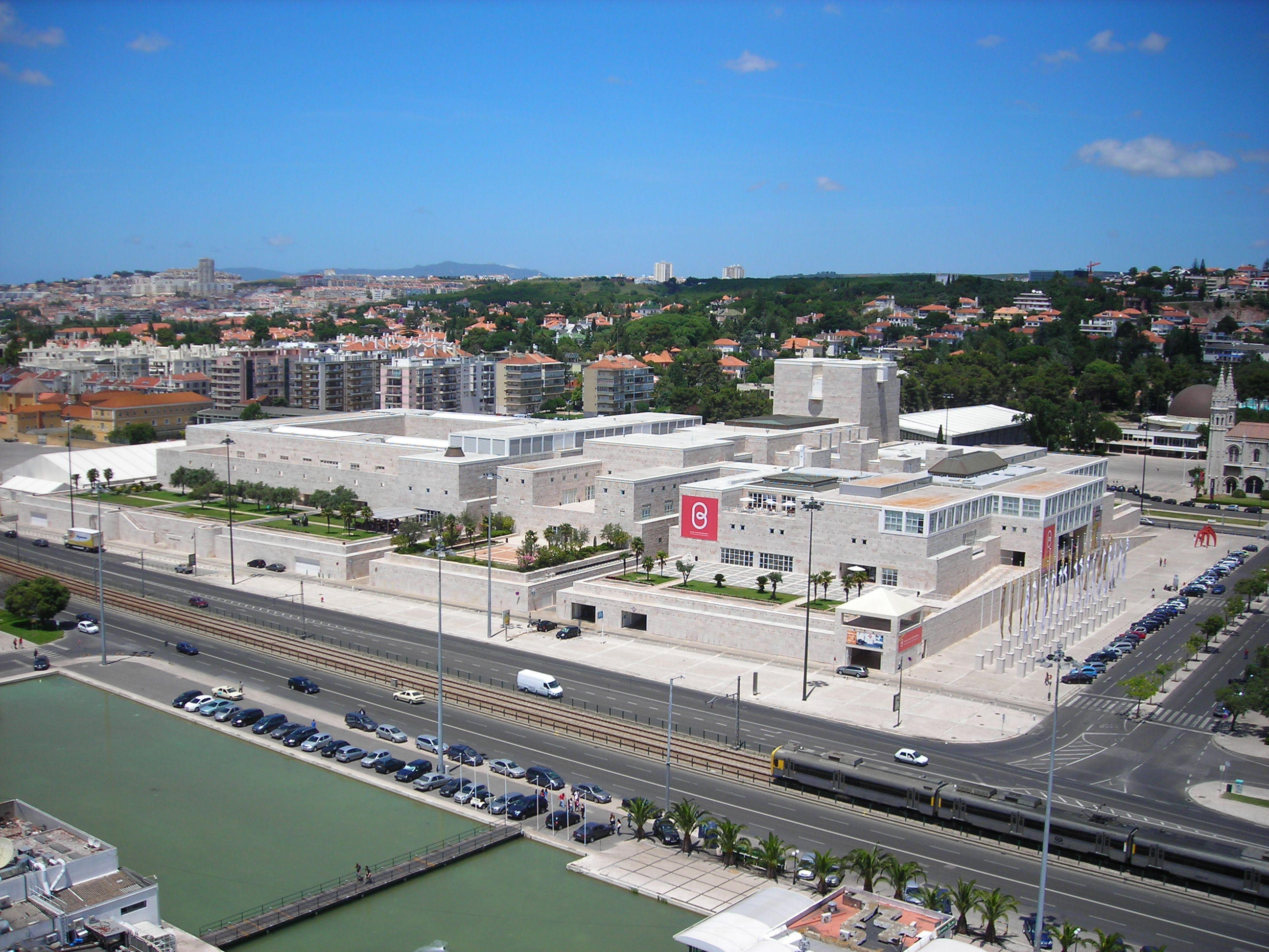 View from Padrão dos Descobrimentos - Centro Cultural de Belém